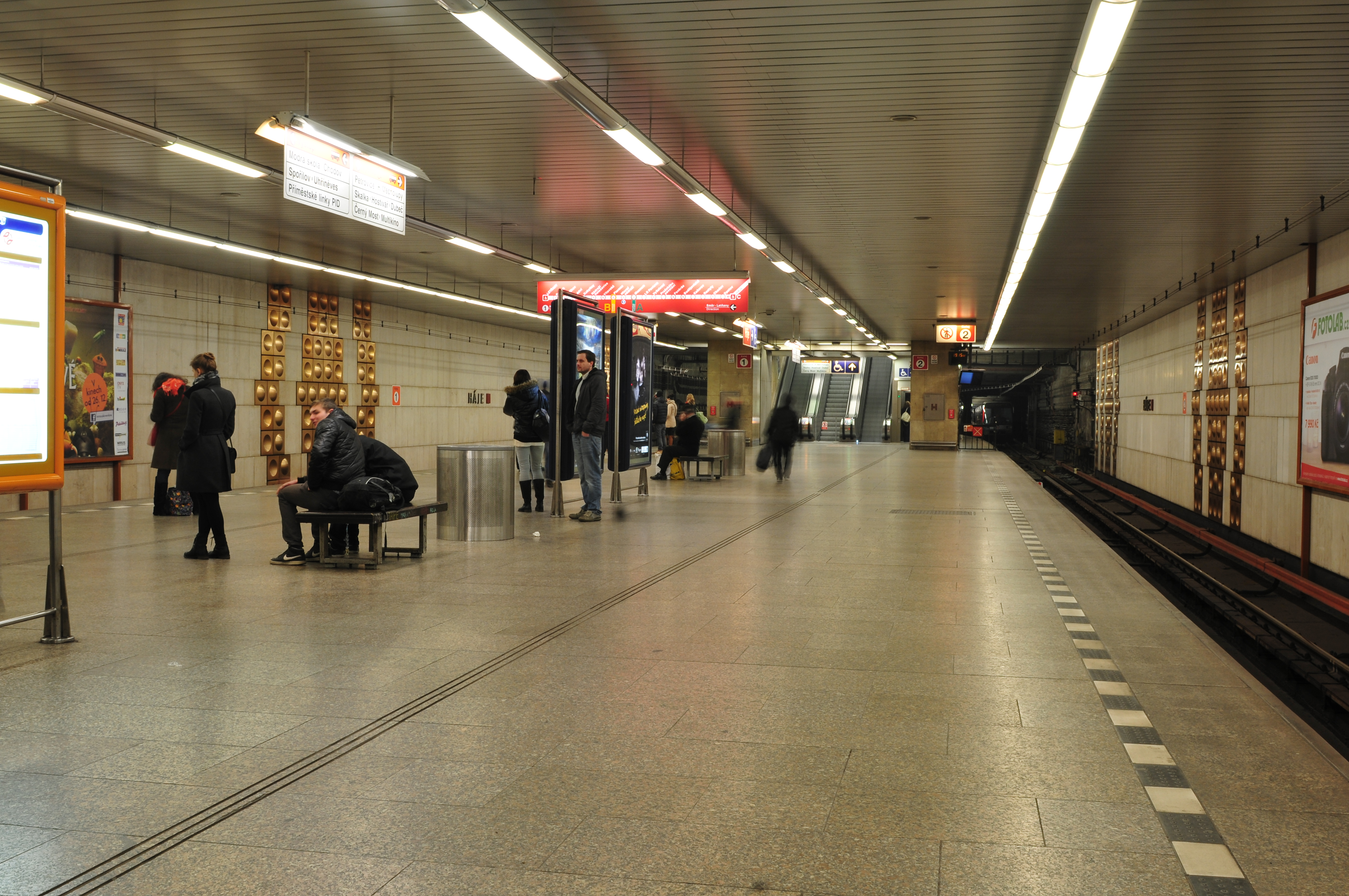 Metro Praha